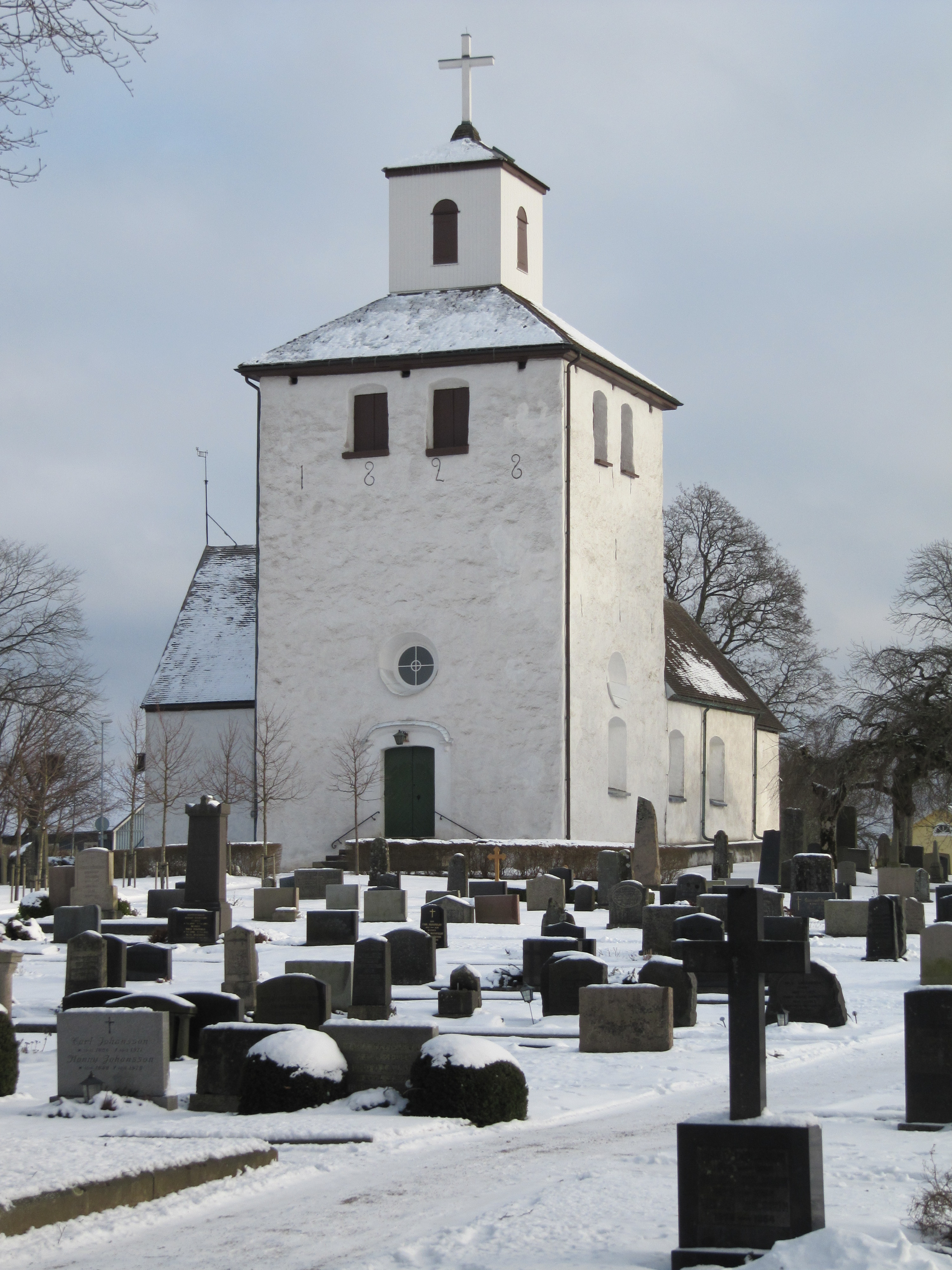 Vittsjö kyrka